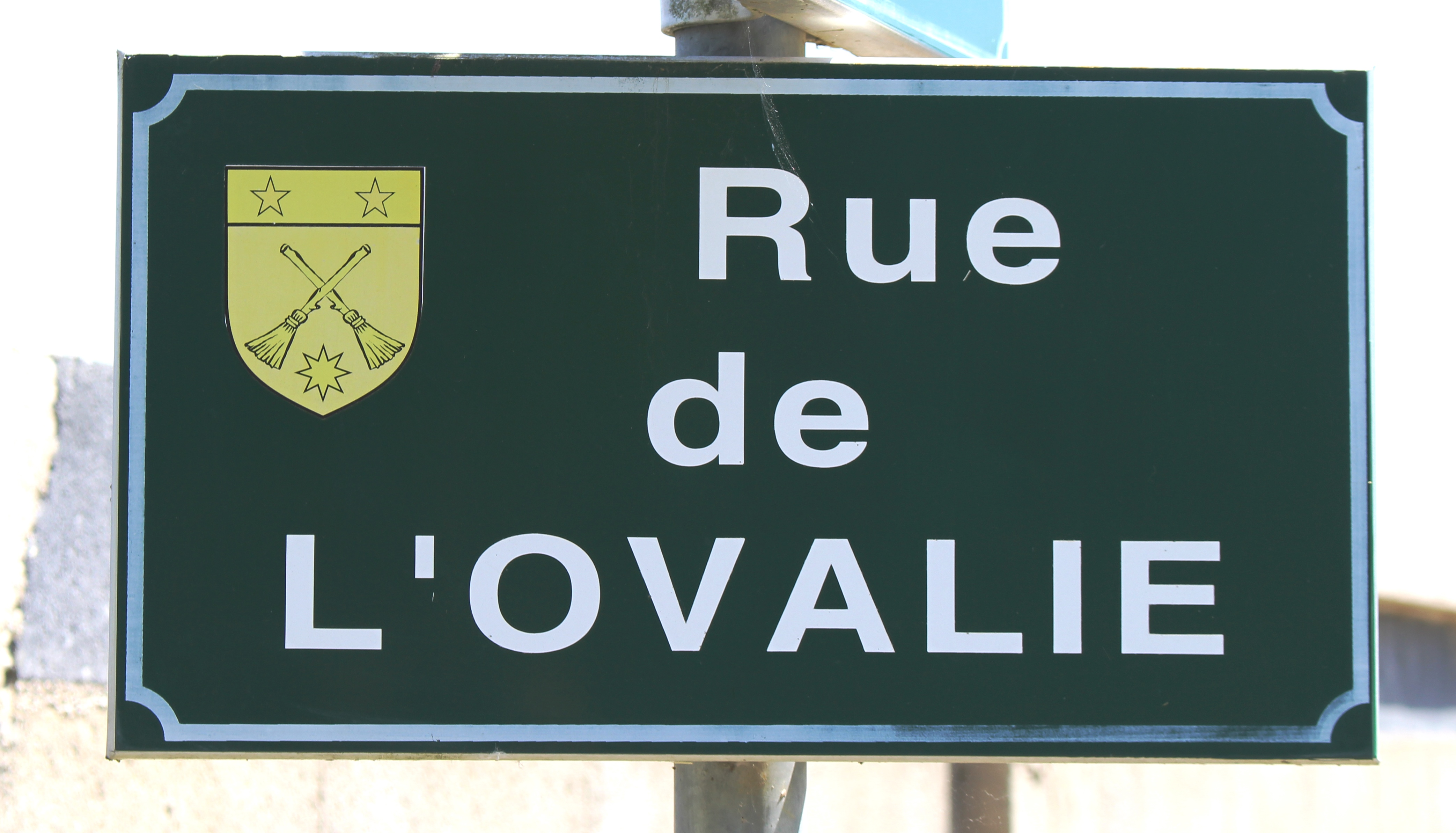 Louit (Hautes-Pyrénées)